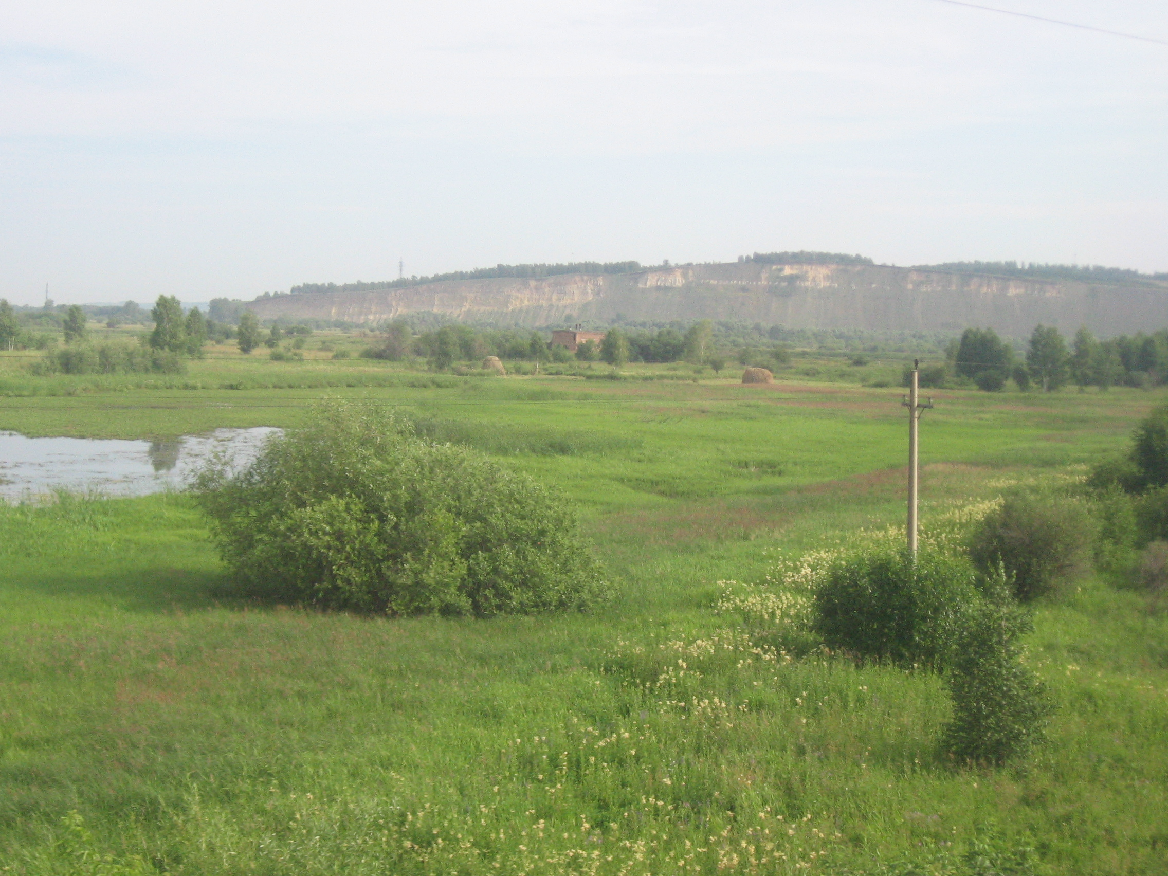 Вид из окна поезда